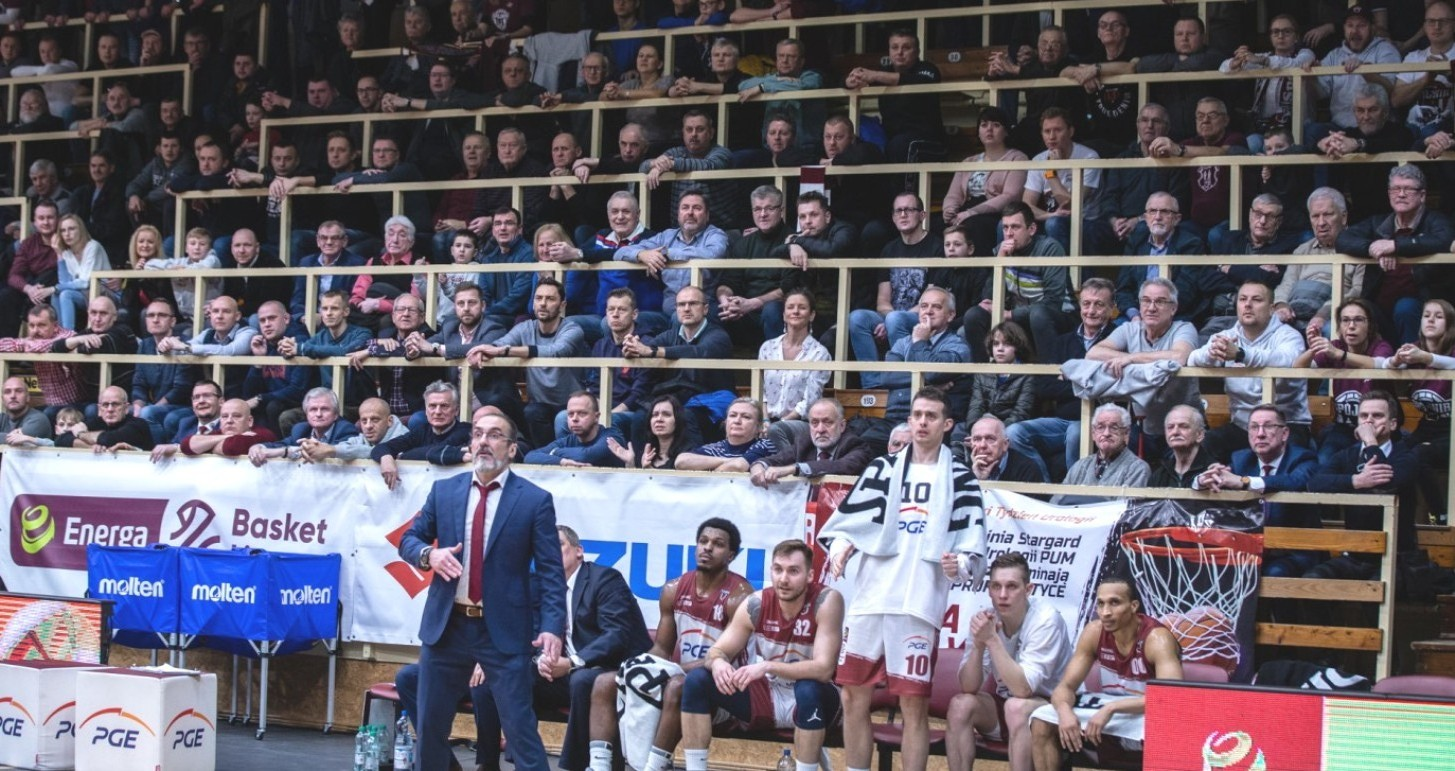 Stargard. PGE Spójnia - Trefl Sopot